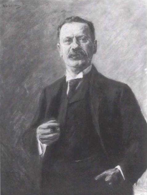 Max Liebermann: Bildnis des Eduard Arnhold 1907-1919